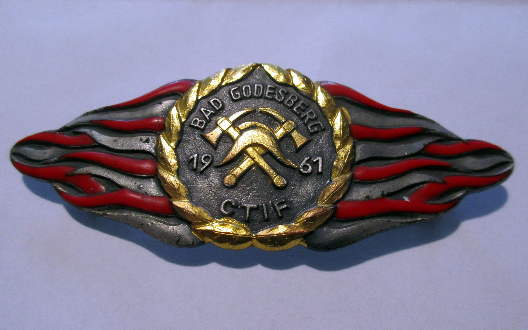 Das Abzeichen wurde nur den besten teilnehmenden Mannschaften verliehen.